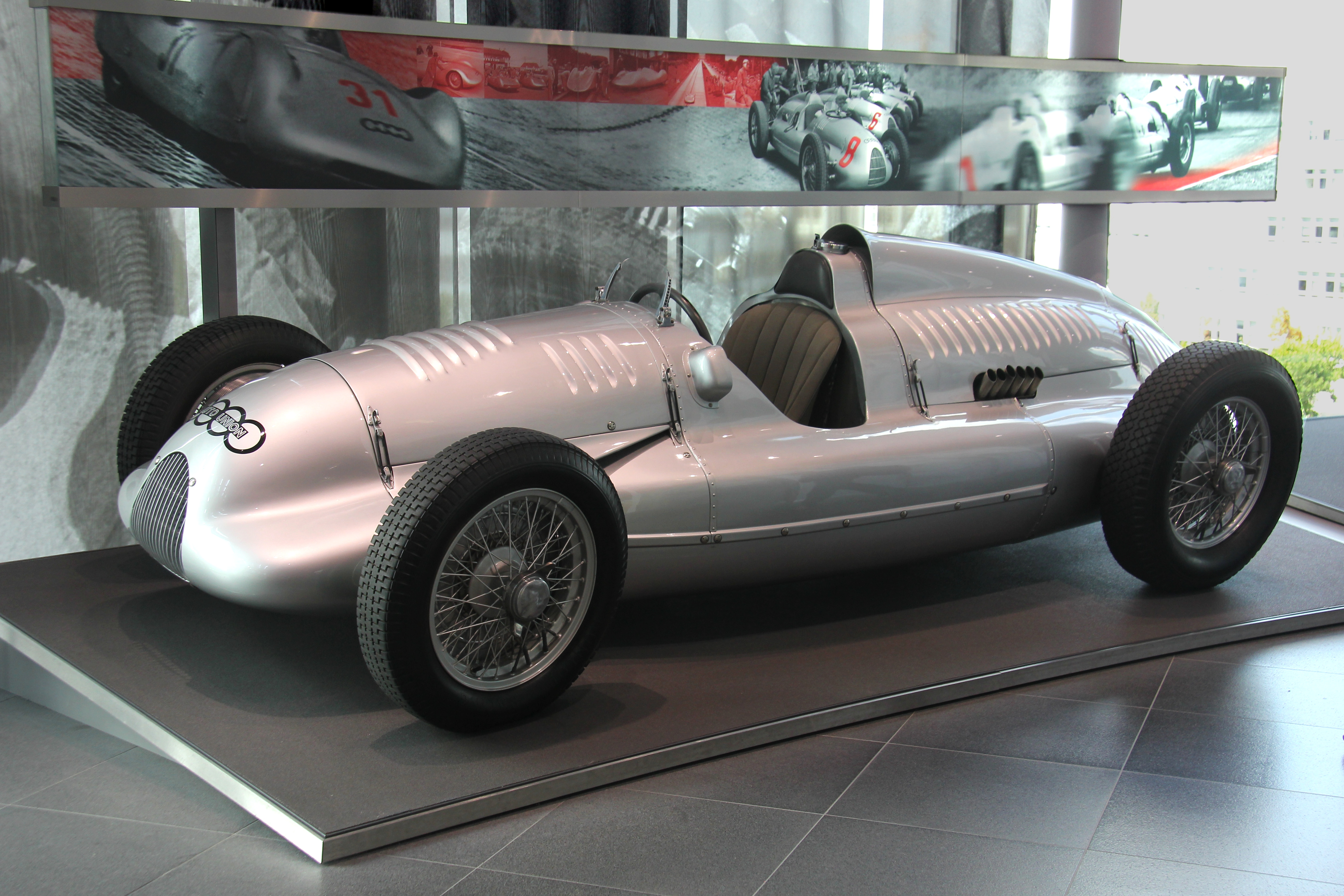 Auto Union Typ D im museum mobile. Rennwagen mit V12-Mittelmotor, 2985 cm³, 485 PS bei 7000/min, Höchstgeschwindigkeit ca. 330 km/h. Bauzeit 1938/1939. Der ausgestellte Wagen ist einer von dreien, die den Krieg überdauerten. Zwischen 1992 und 1994 wurde er in England restauriert.